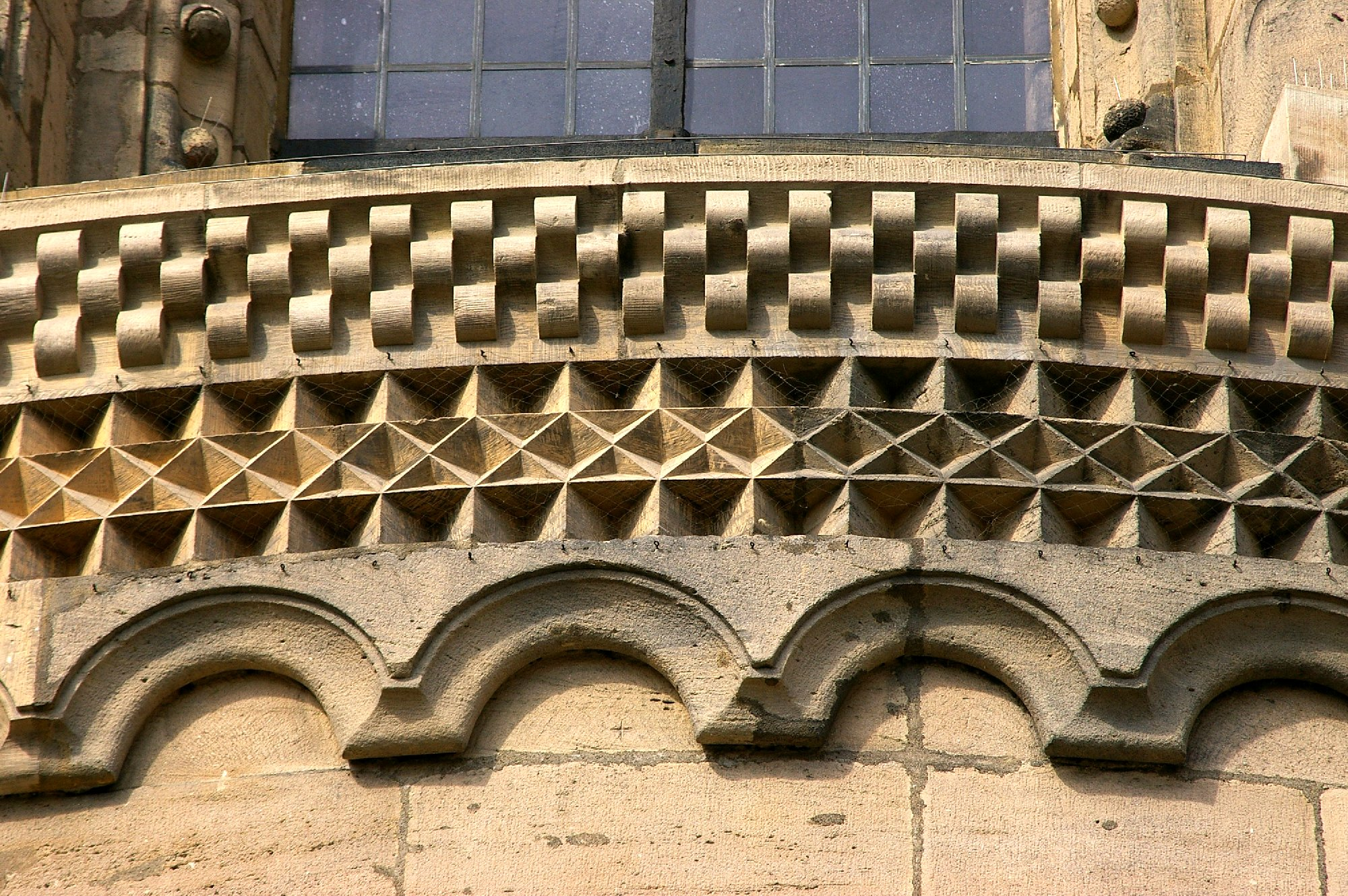 Bamber-Dom - typisch romanische Friese